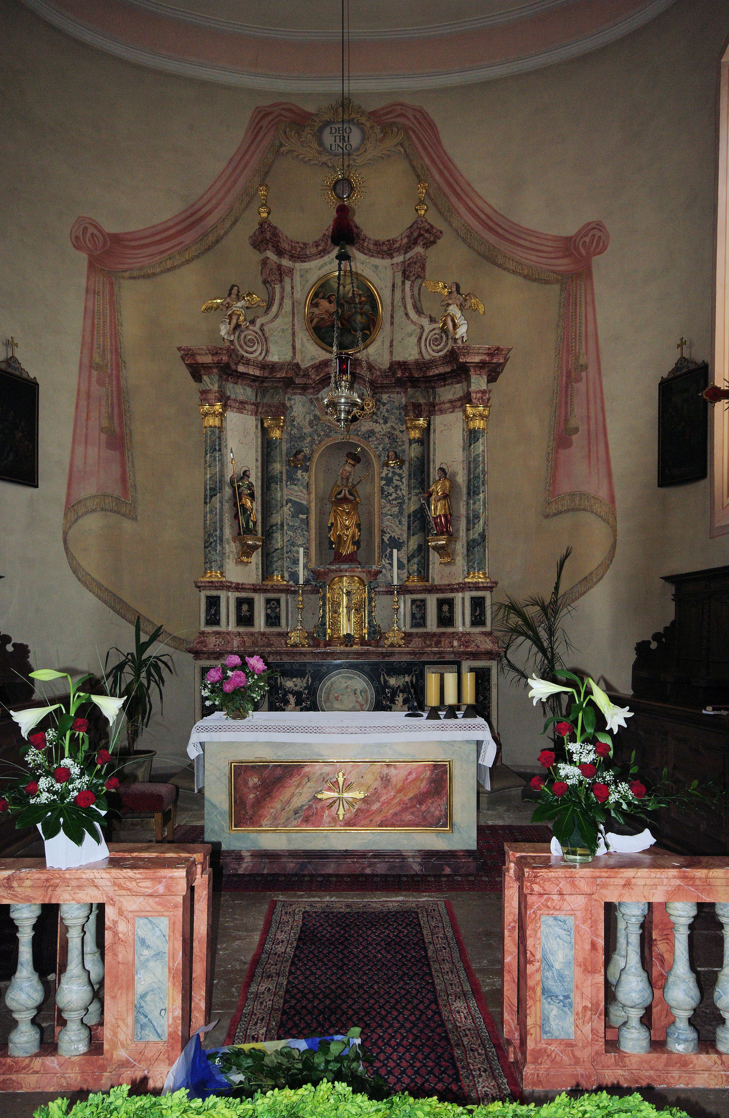 Pfarrkirche St. Thomas in Betzenhausen ein Stadtteil Freiburgs Der Hauptaltar